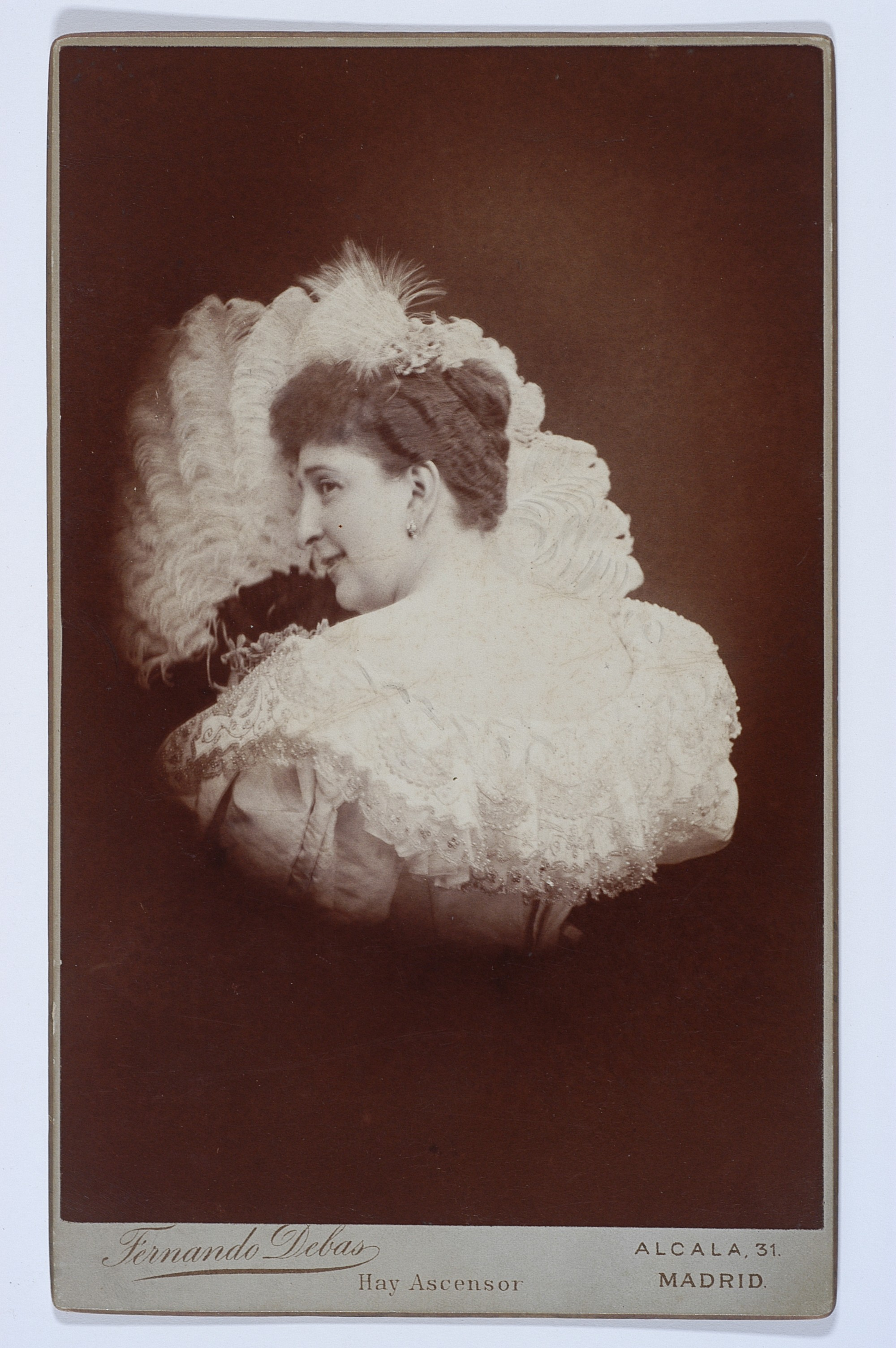 Teresa Arkel, 1896 r.